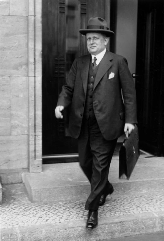 Franz Bracht In der heutigen Kabinettssitzung wurden wichtige Beschlüsse gefasst. U.B.z.: Reichskommissar Dr. Bracht verlässt nach der Sitzung die Reichskanzlei 24485-32 Abgebildete Personen: Bracht, Dr.: Ministerialdirigent im Preußischen Ministerium des Inneren, Deutschland Information added by Wikimedia users.- am 29. Oktober 1932 als Reichsminister ohne Geschäftsbereich in die von Reichskanzler Franz von Papen geführte Reichsregierung berufen. - Am 3. Dezember 1932 als Reichsinnenminister in die von Reichskanzler Kurt von Schleicher geführte Reichsregierung berufen.